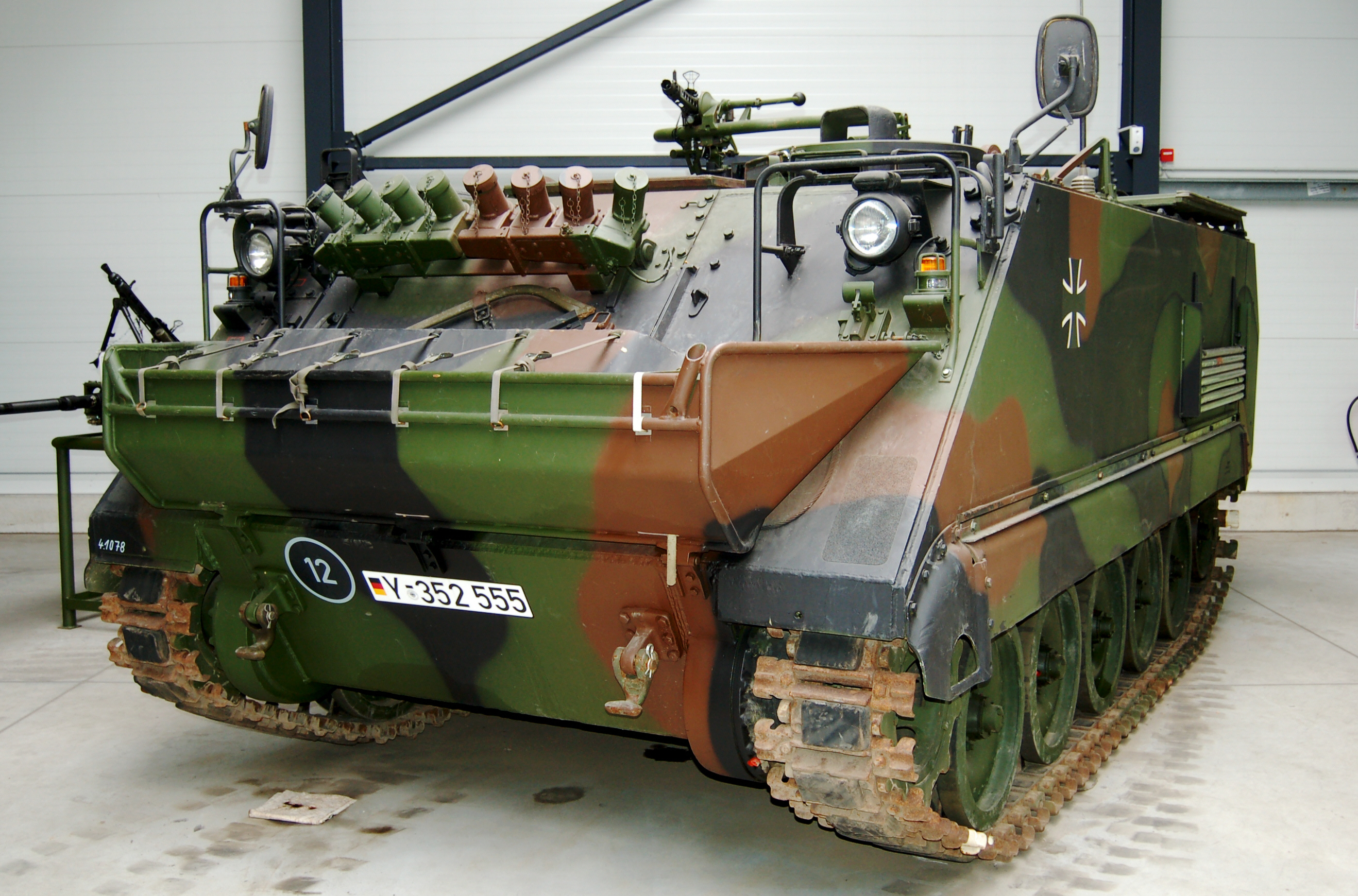 Panzermörser M 113 A1 G (Links) Besatzung:5 Soldaten Gewicht: 12,4 Tonnen Motorleistung: 154 kW (220 PS) Bewaffnung: 1 Mörser 120 mm von Tampella (ISR) und 1 Fliegerabwehr MG 7,62 mm Baujahr: 1969 - 1973 Stückzahl Bw: 437(gesammt: ca. 4.000)